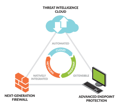 Монгол: Халдлага